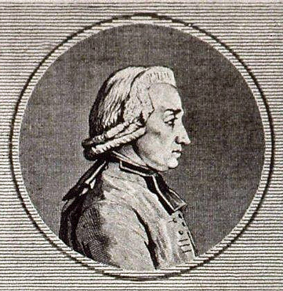 Jean Pierre Saurine, évêque de Strasbourg. 1892. Bibliothèque nationale et universitaire de Strasbourg